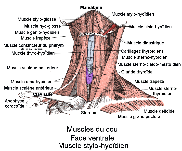 Muscle stylo huoïdien. Vue antérieure du cou. Anatomie humaine